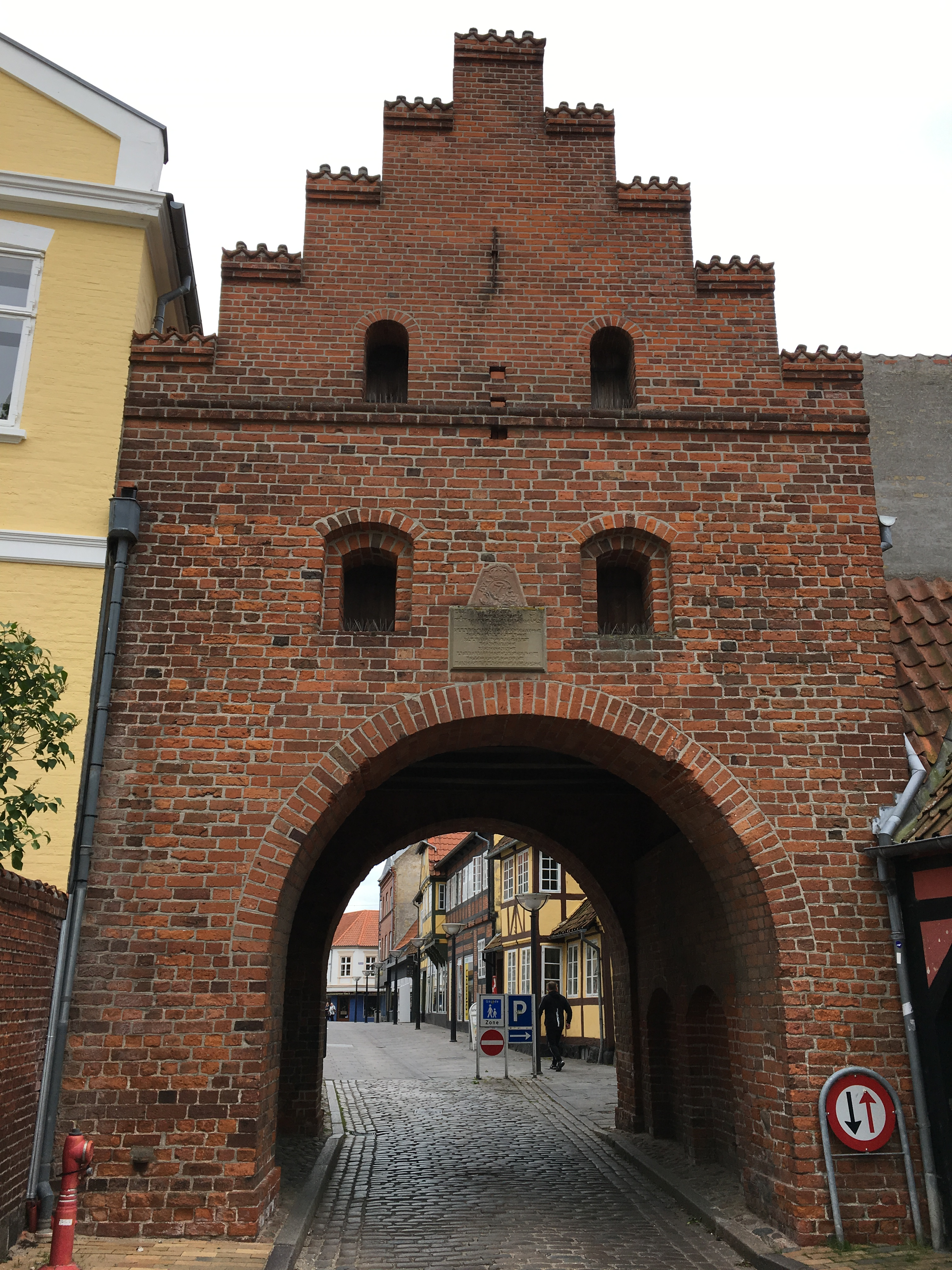 Vesterport set fra vest